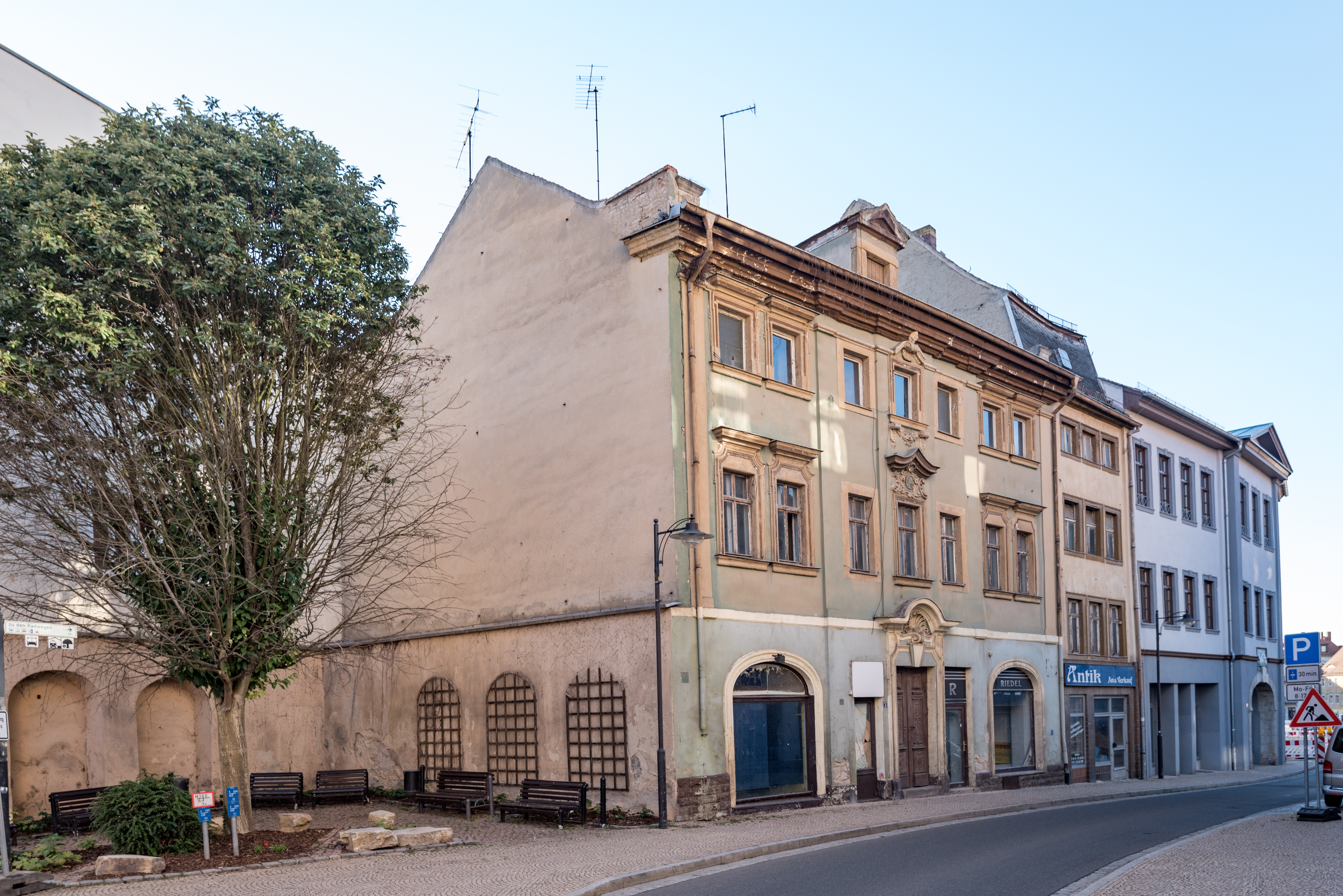 Weißenfels, Große Burgstraße 5